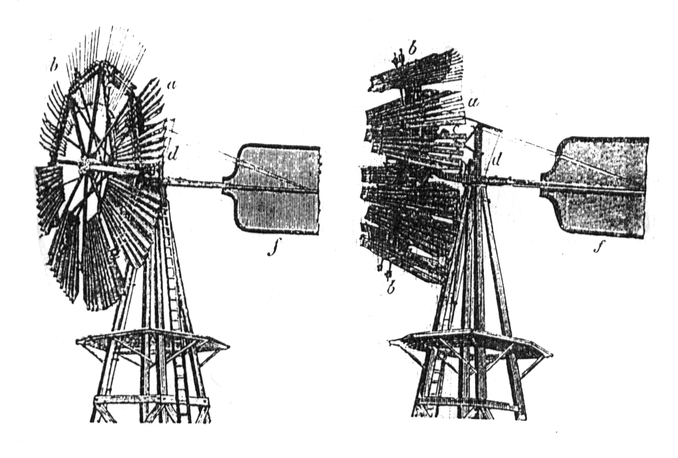 Halladayova turbina - regulace